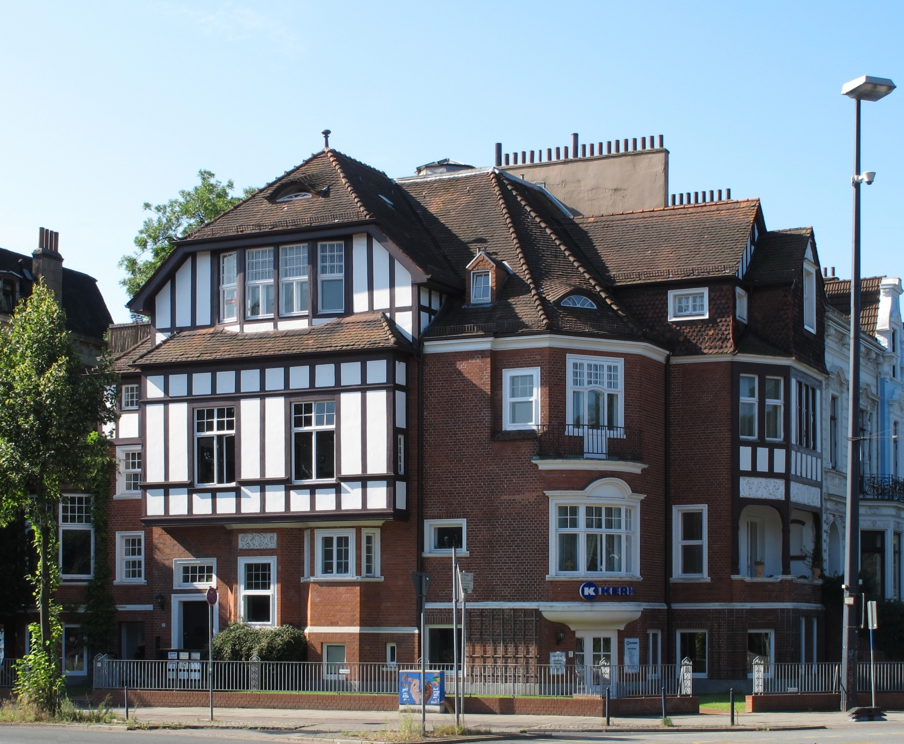 Villa Otto, Schwenekes Privat-Lehrinstitut in Bremen, Hollerallee 67Das abgebildete Objekt ist ein geschütztes Kulturdenkmal in der Freien Hansestadt Bremen, mit der Nr. 0614 beim Landesamt für Denkmalpflege registriert.